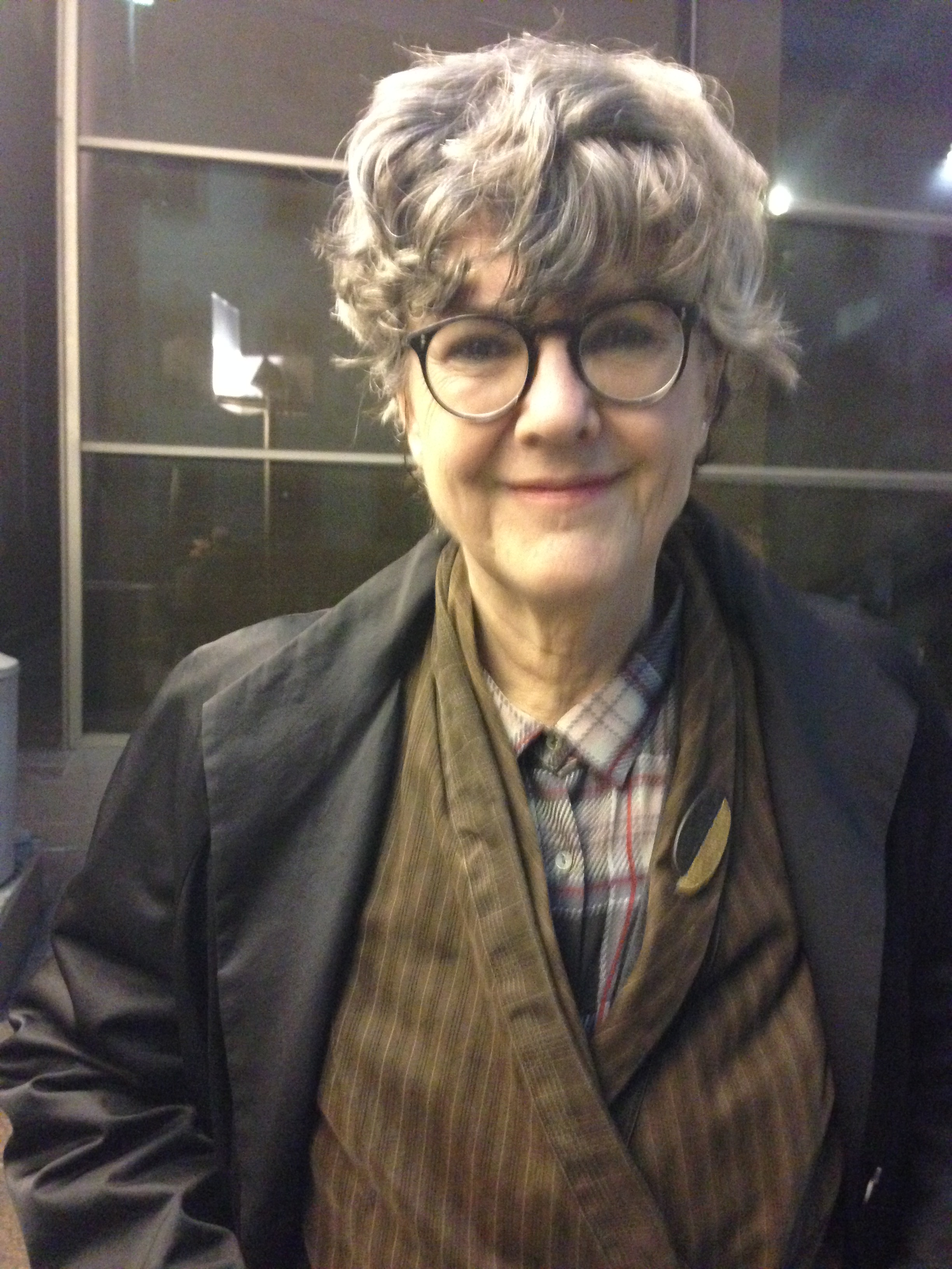 Barcelona, 5 abril de 2016